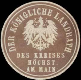 Sealing stamp Title: Der K. Landrath des Kreises Höchst am Main Description: braun, weiß, geprägt Place: Höchst/Main size: cm